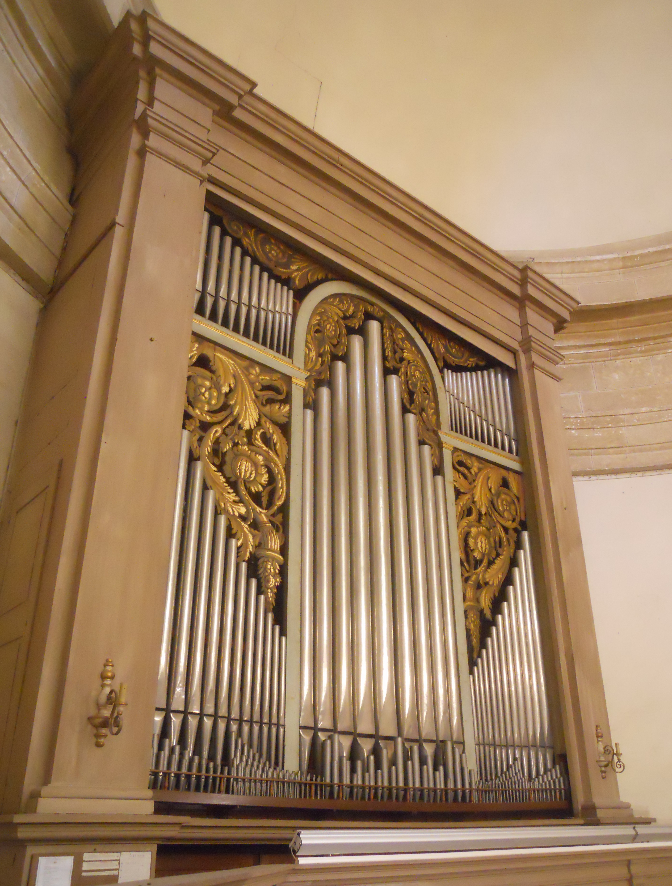 L'organo a canne Filippo Tronci (I+P/29) della cattedrale di Montepulciano, costruito nel 1837-1838.